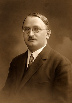 Eugen Dostál (1889 - 1943), Český historik umění a vysokoškolský profesor.